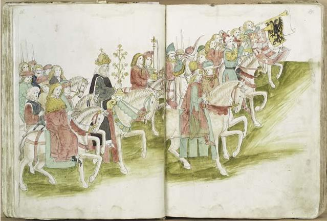 Rosgartenmuseum Konstanz, Hs. 1, Richental: Konzilschronik. In: Feger, Otto (Bearb.): Ulrich Richental